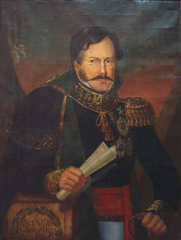 Atribuído a Manuel de Araújo Porto-alegre: Retrato de Sebastião Barreto Pereira Pinto, óleo sobre tela, sem data, acervo do Museu Júlio de Castilhos